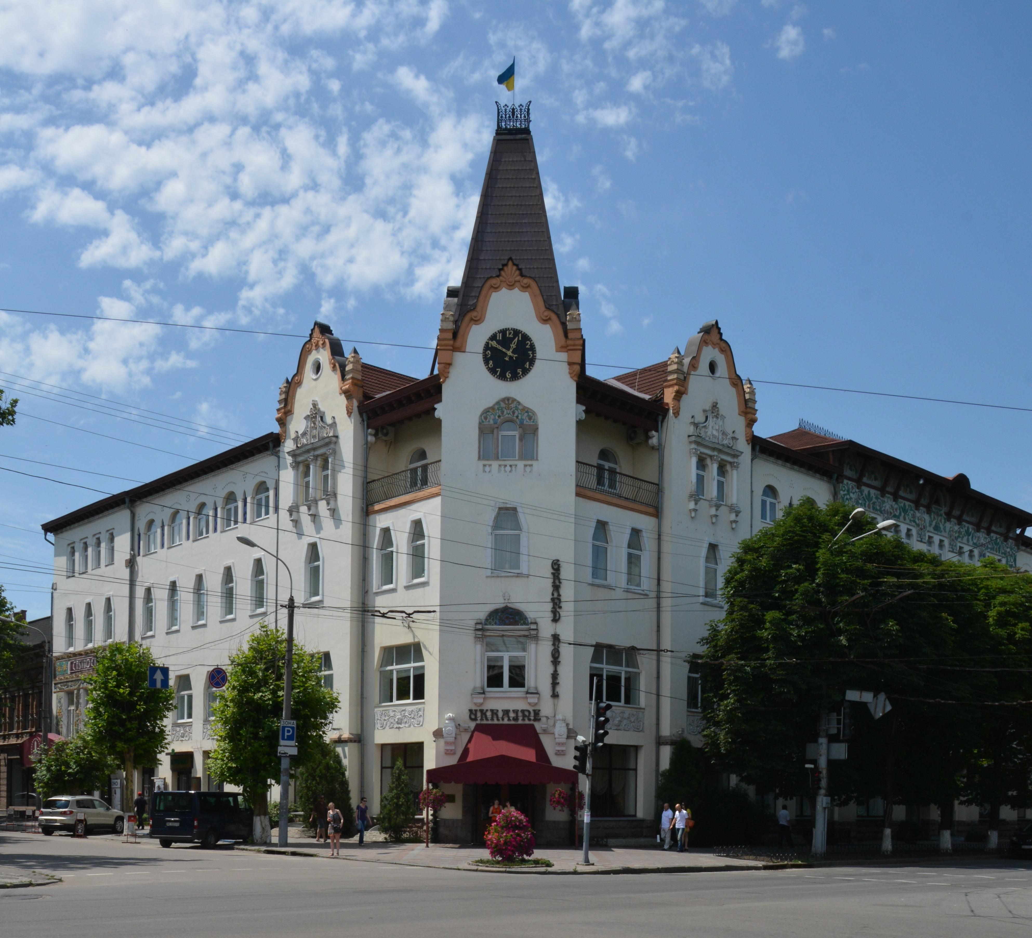 Будинок готелю "Україна", Дніпропетровськ, Короленка вул., 2